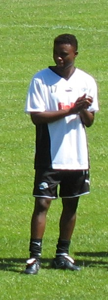 Andrew Sinkala, Spieler beim SC Paderborn 07